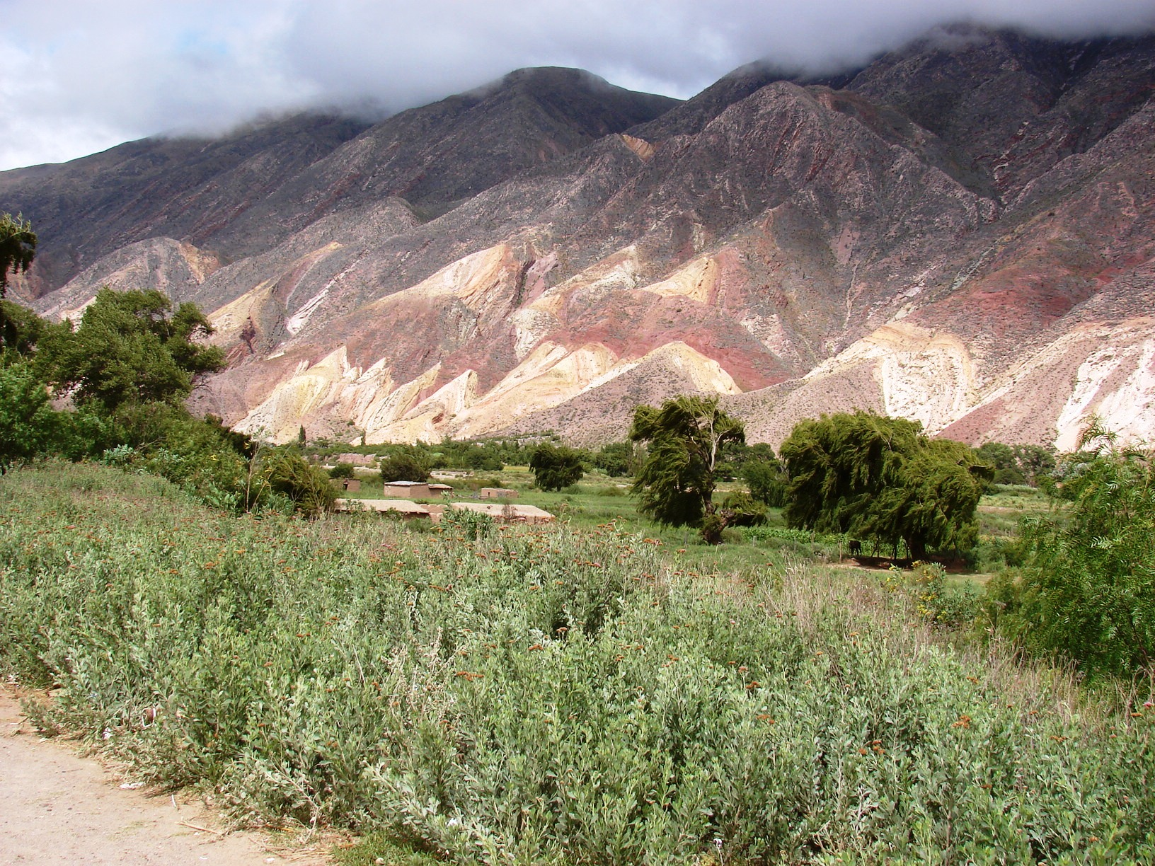 Paisaje típico de la Quebrada de Humahuaca